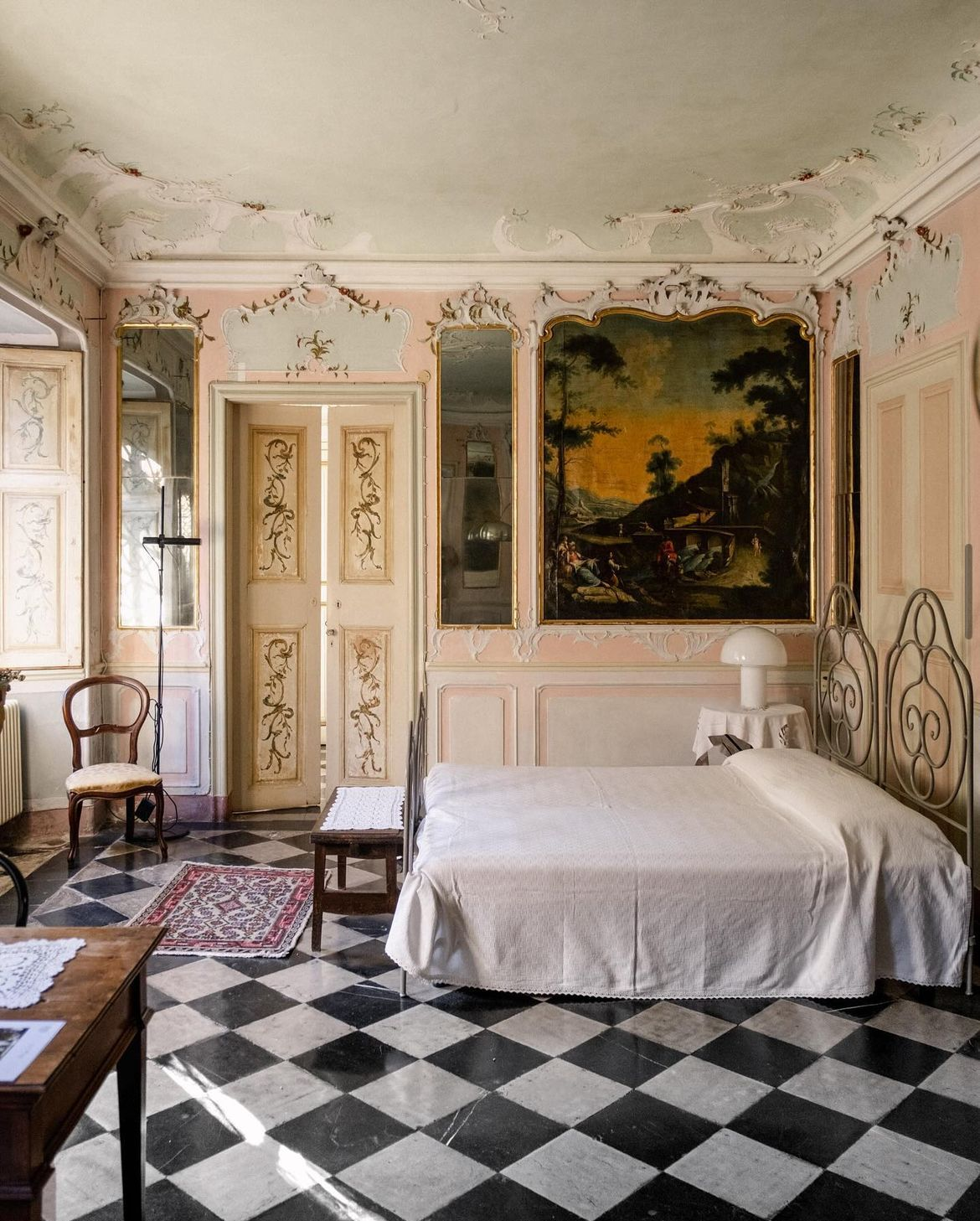 Dettaglio dell'interno di una delle camere da letto.